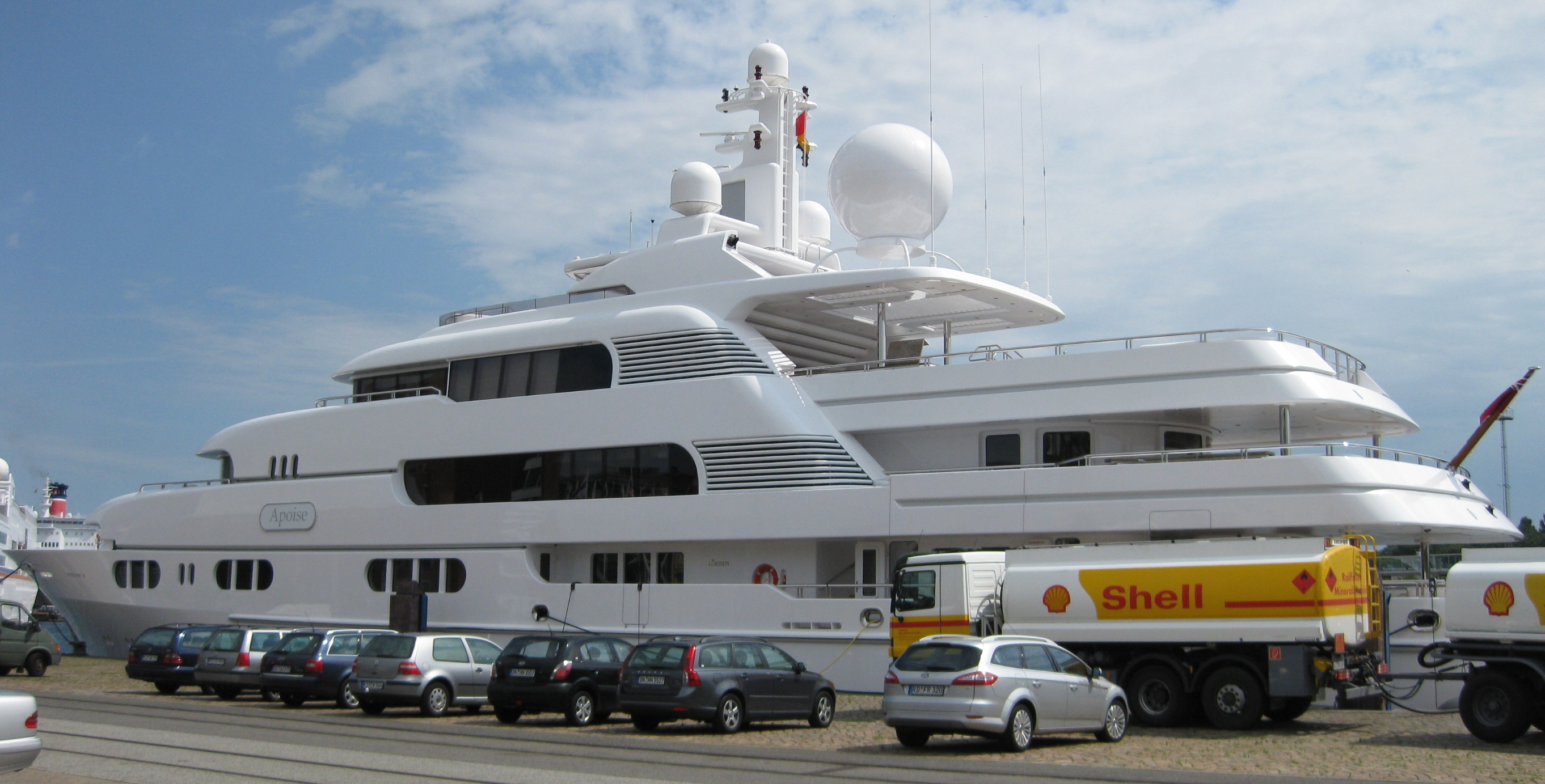 Apoise am Bollhörnkai in Kiel